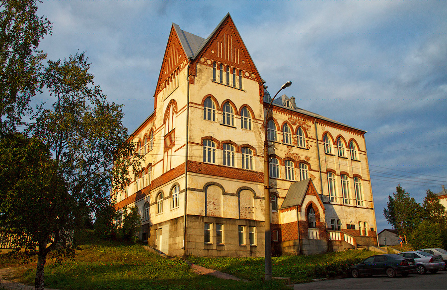 Рождественские открытки